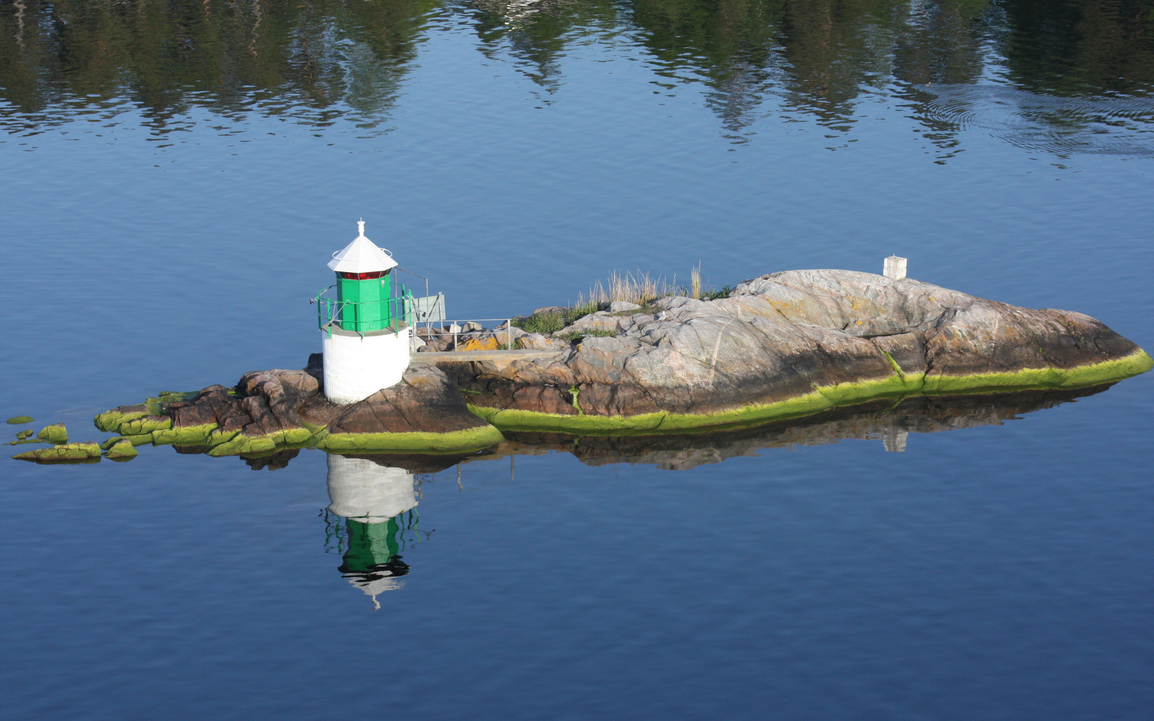 Mjölköns fyr, Österåkers kommun, Stockholms skärgård